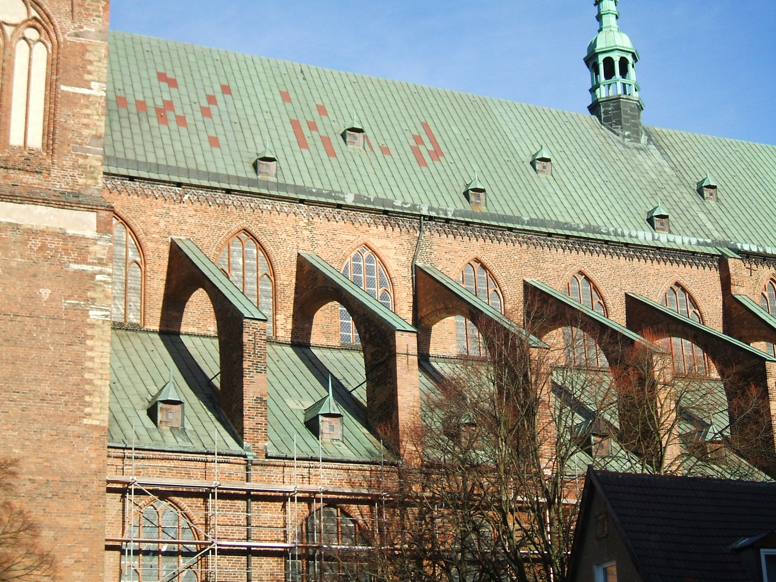 Stralsund, Germany. Das Foto zeigt Details des Rathauses (außen).